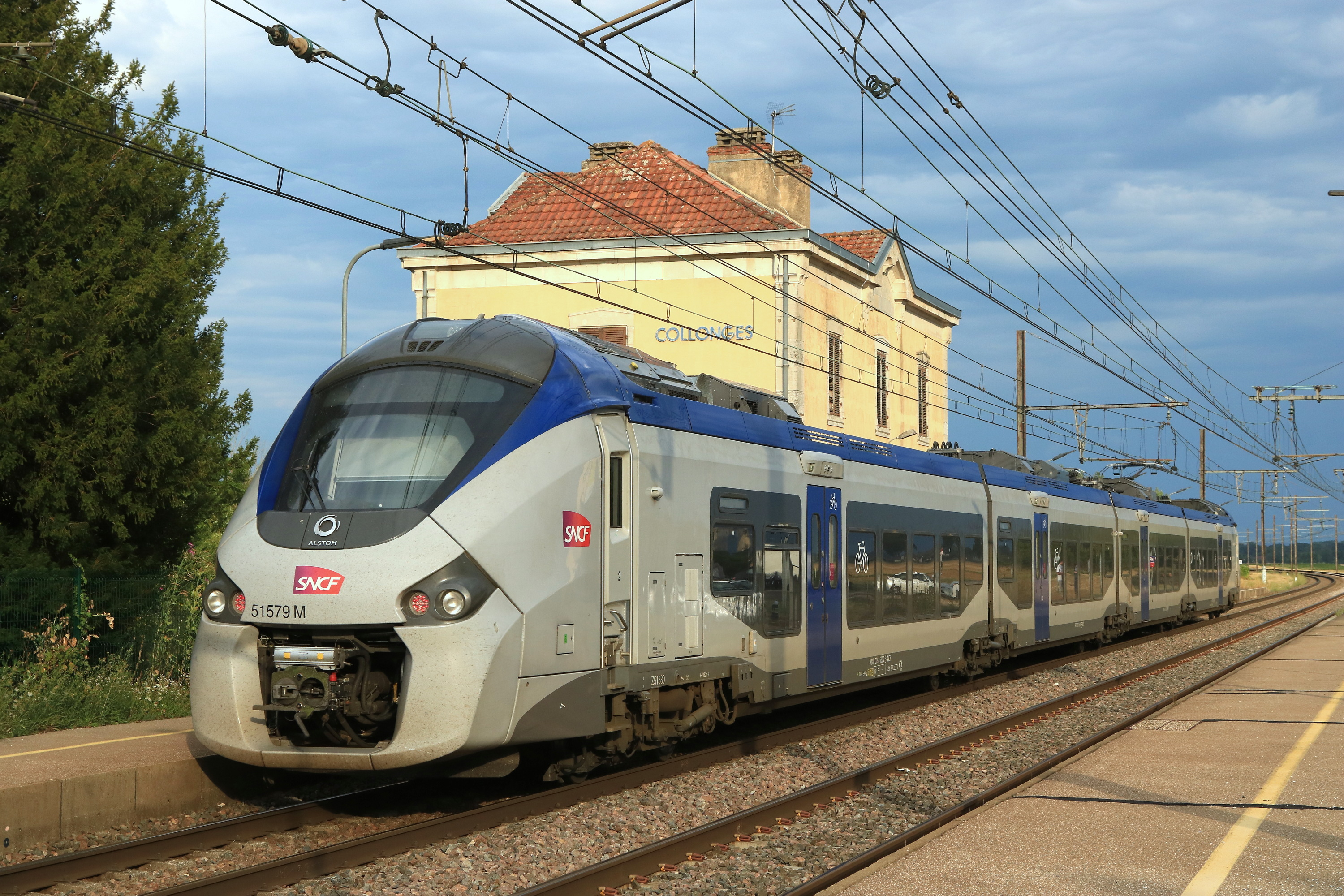 Le TER n° 894227 (Dijon - Besançon) marque un arrêt supplémentaire en gare de Collonges, assuré par un Régiolis Z 51579.